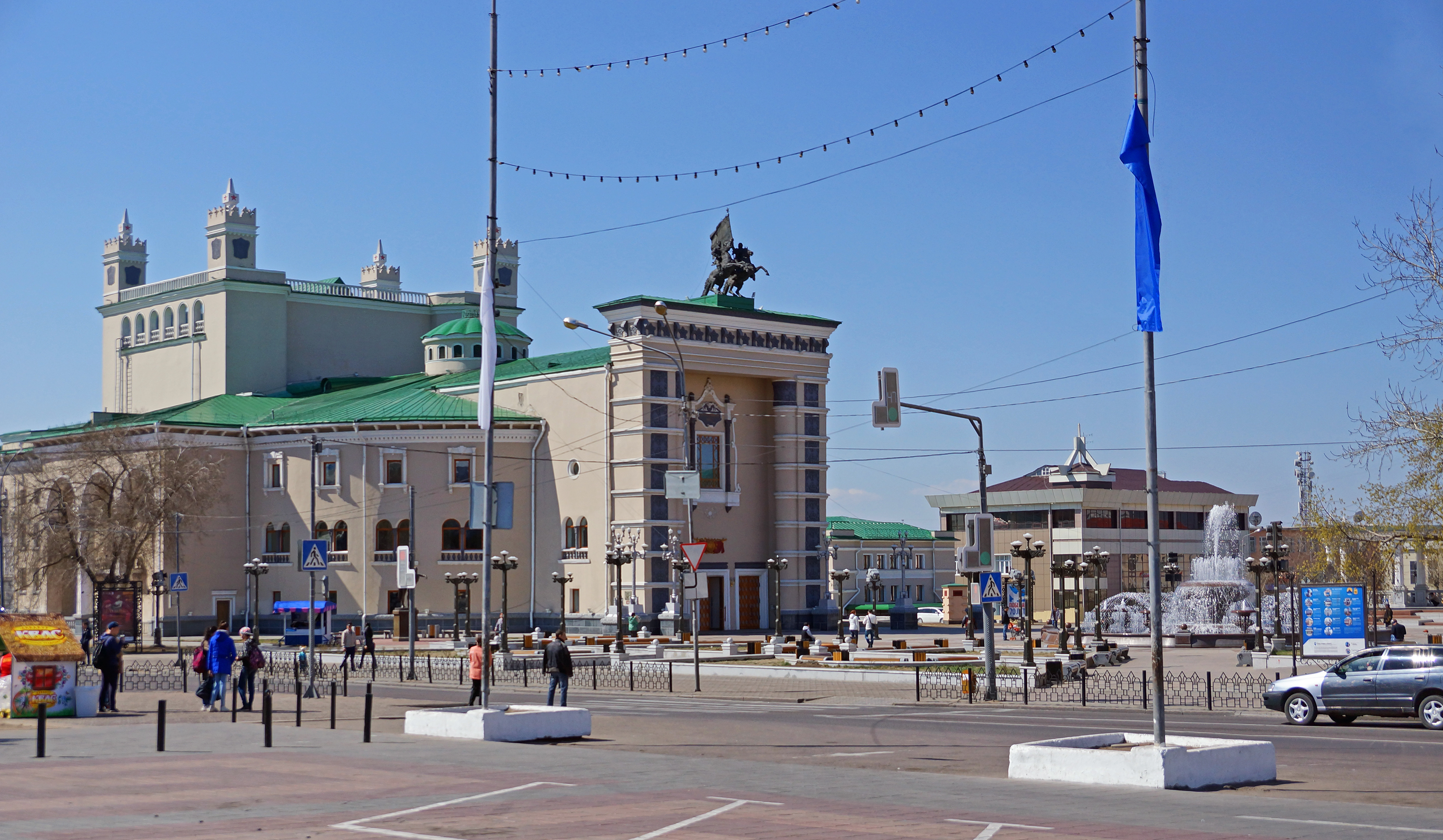 Бурятский театр оперы и балета: улица Ленина, 51, Улан-Удэ, Бурятия